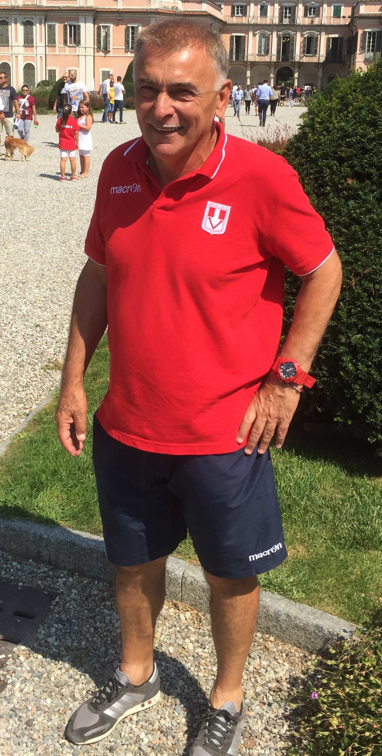 Ernestino Ramella, allenatore del Varese Calcio